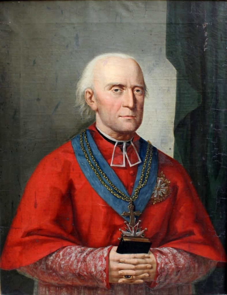 Portret Tymoteusz Paweł Gorzeński (1743-1825)